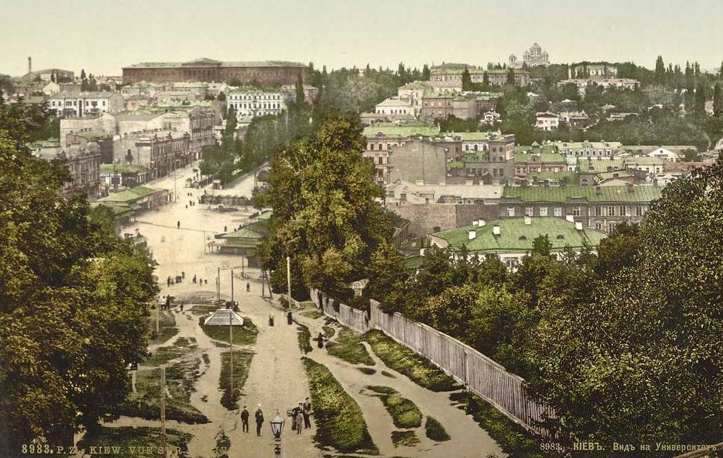 Будівля Київського університету в кінці ХІХ ст.